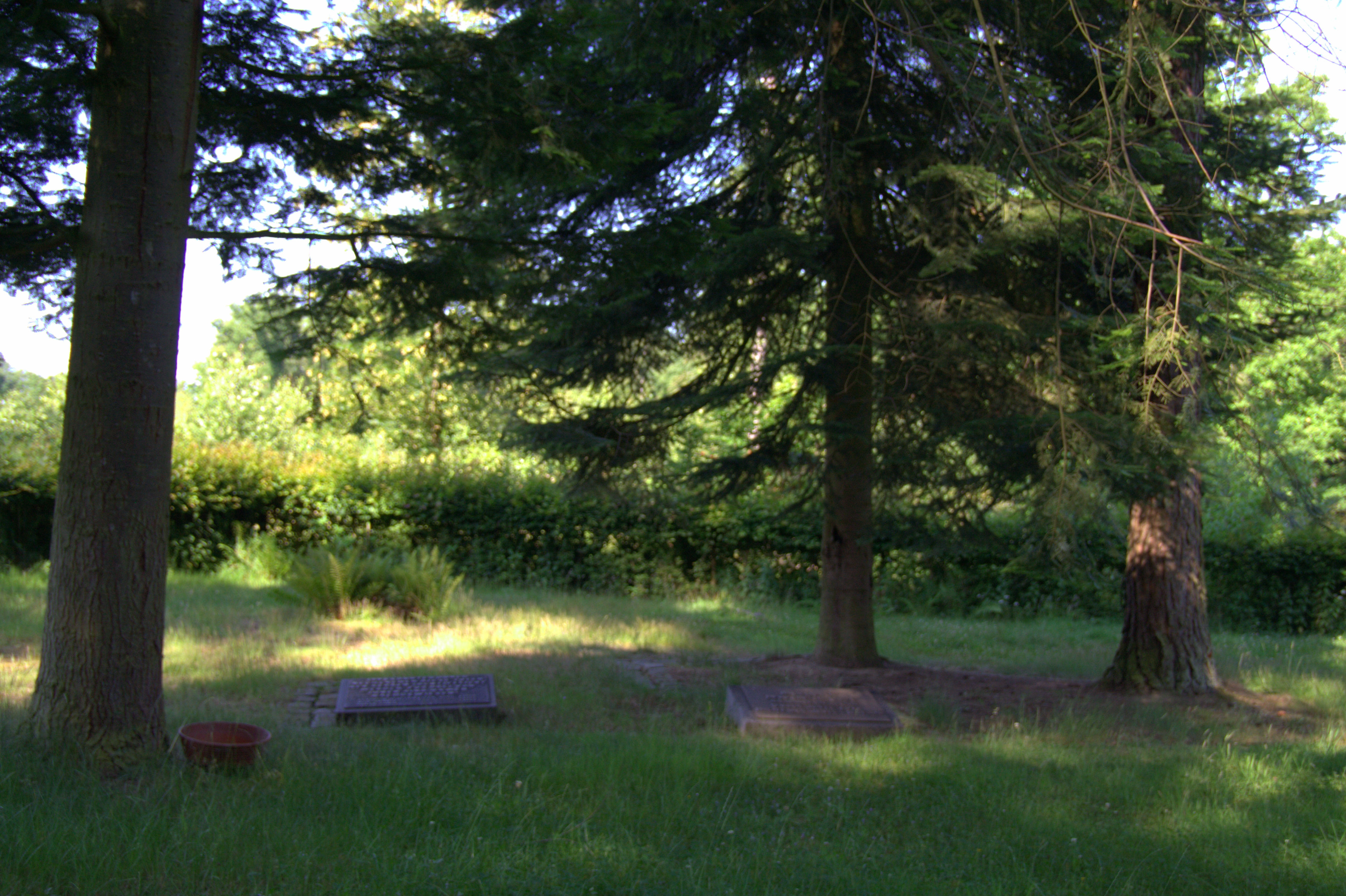 Blick auf den Gedenkort Waldfriedhof Trutzhain